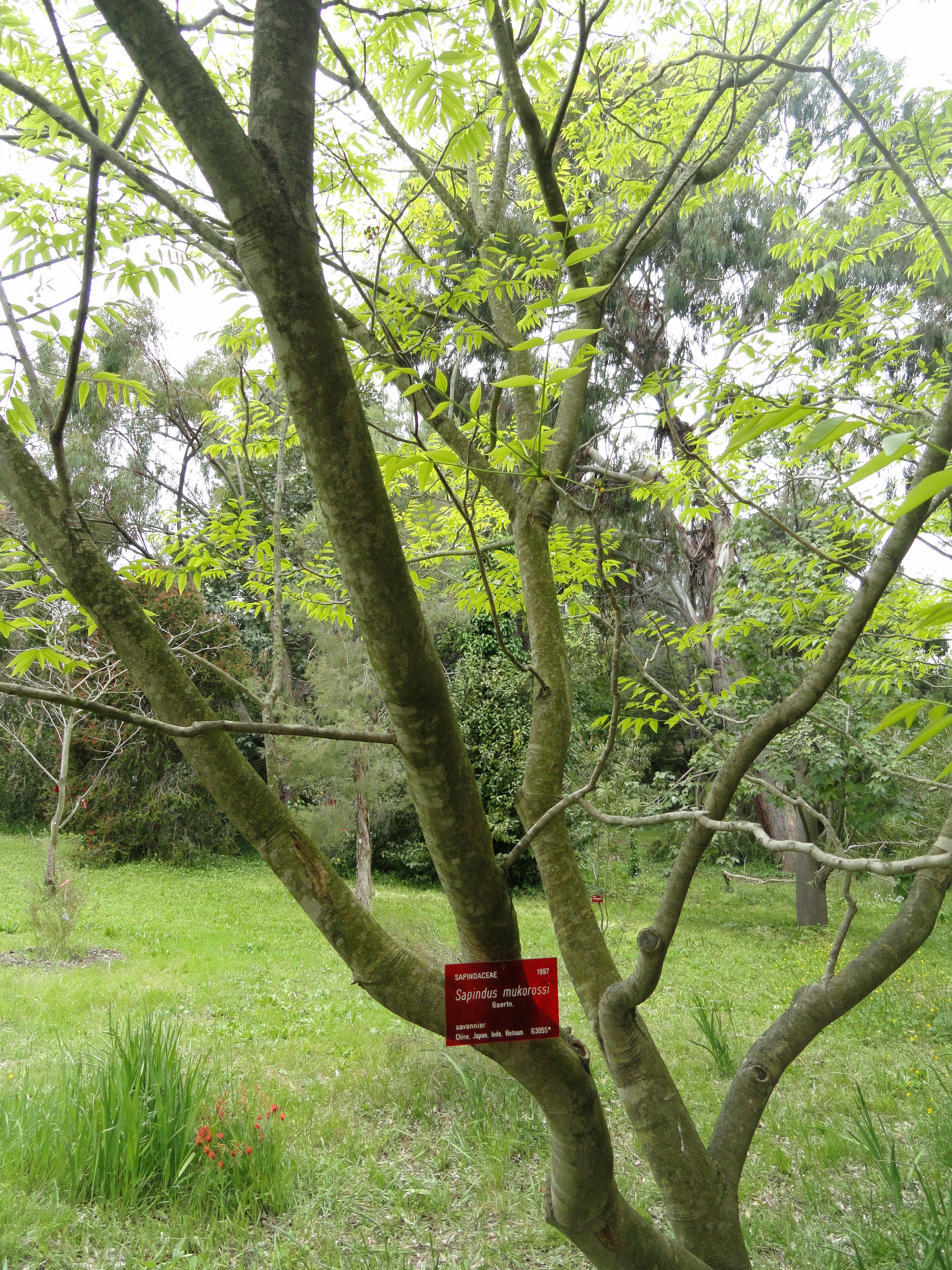 Sapindus mukorossi specimen in the Jardin botanique de la Villa Thuret, Antibes Juan-les-Pins, Alpes-Maritimes,France.